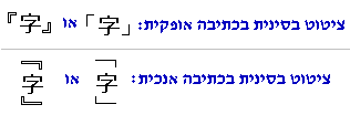 יצרתי את התמונה מצילום מסך של הערך Quotation Mark בוויקי באנגלית ( בתוספת טקסט להסבר.